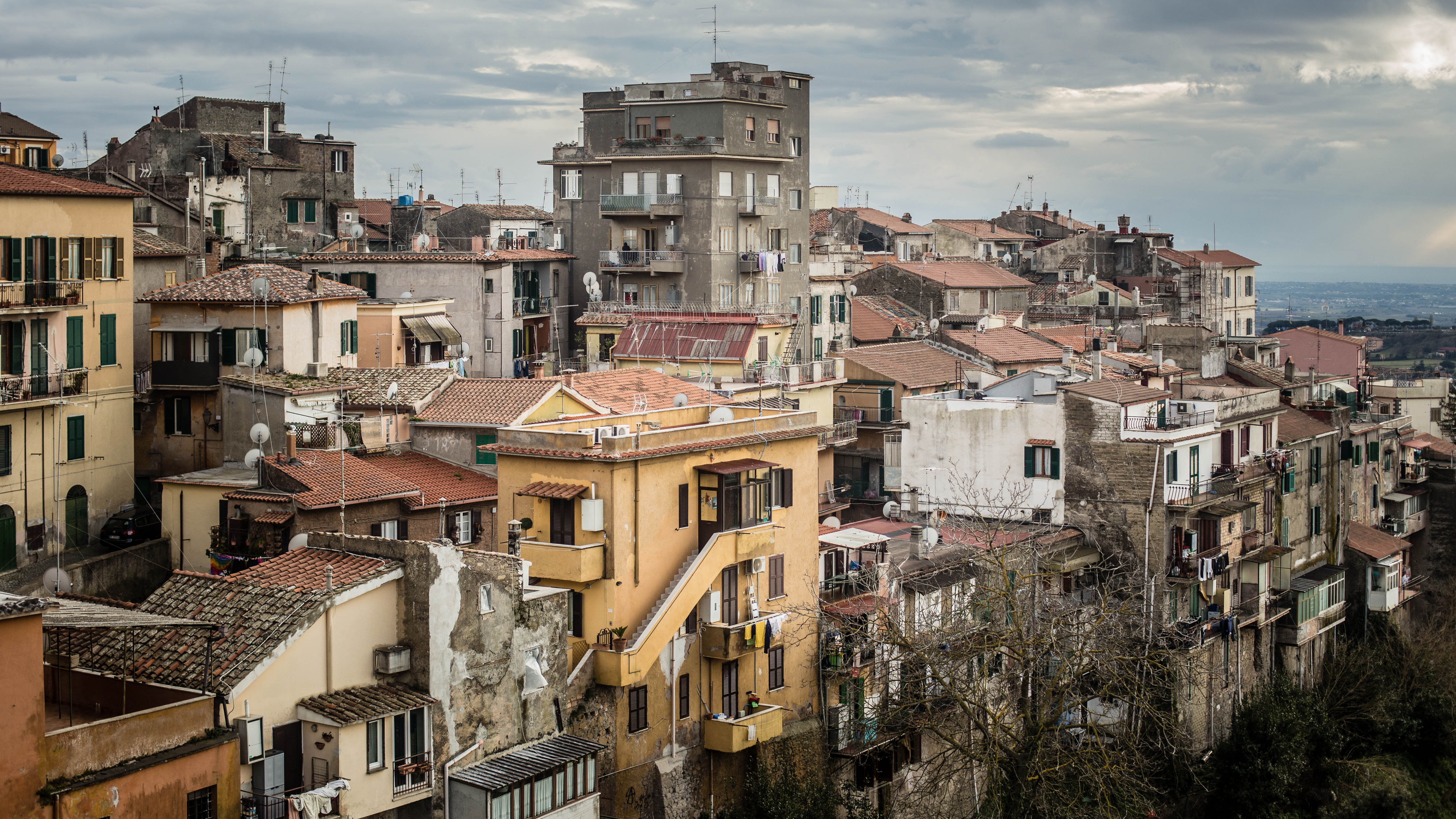 Ariccia, Lazio, Italia